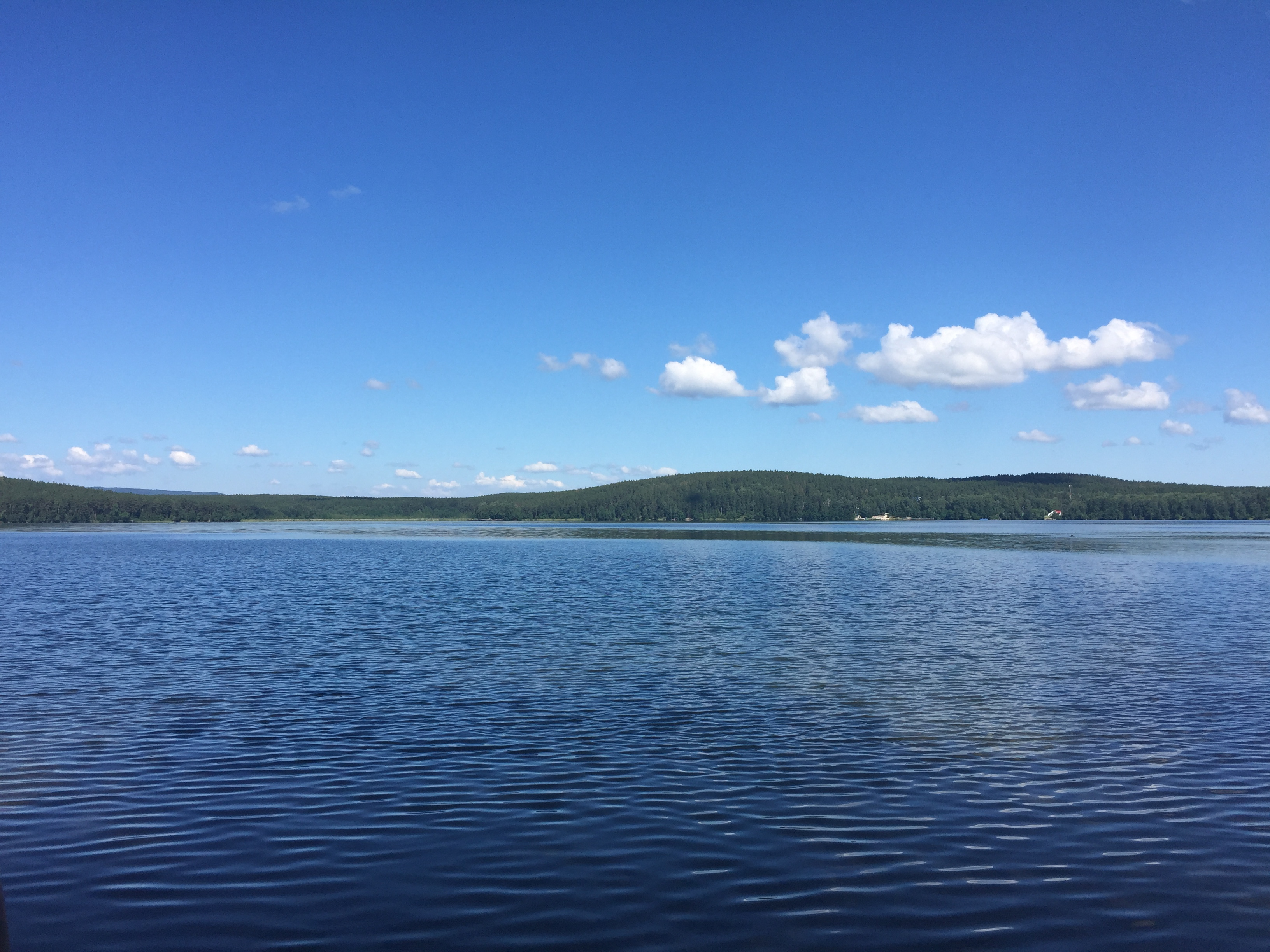 Озеро Увильды: Памятник природы расположен в области предгорий восточного склона Уральских гор в пределах границ Аргаяшского муниципального района, Карабашского и Кыштымского городских округов, Аргаяшский район, Челябинская область This image is related to the protected area of Russia number 7410018